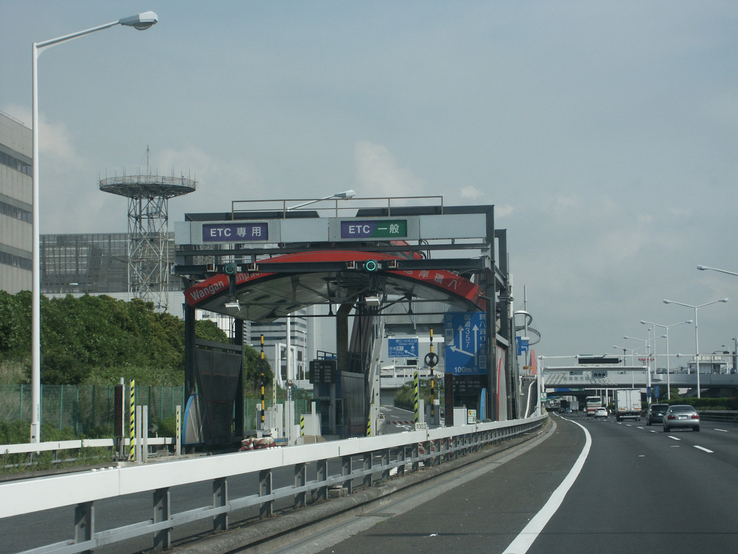 首都高速湾岸線東行き湾岸環八出口料金所